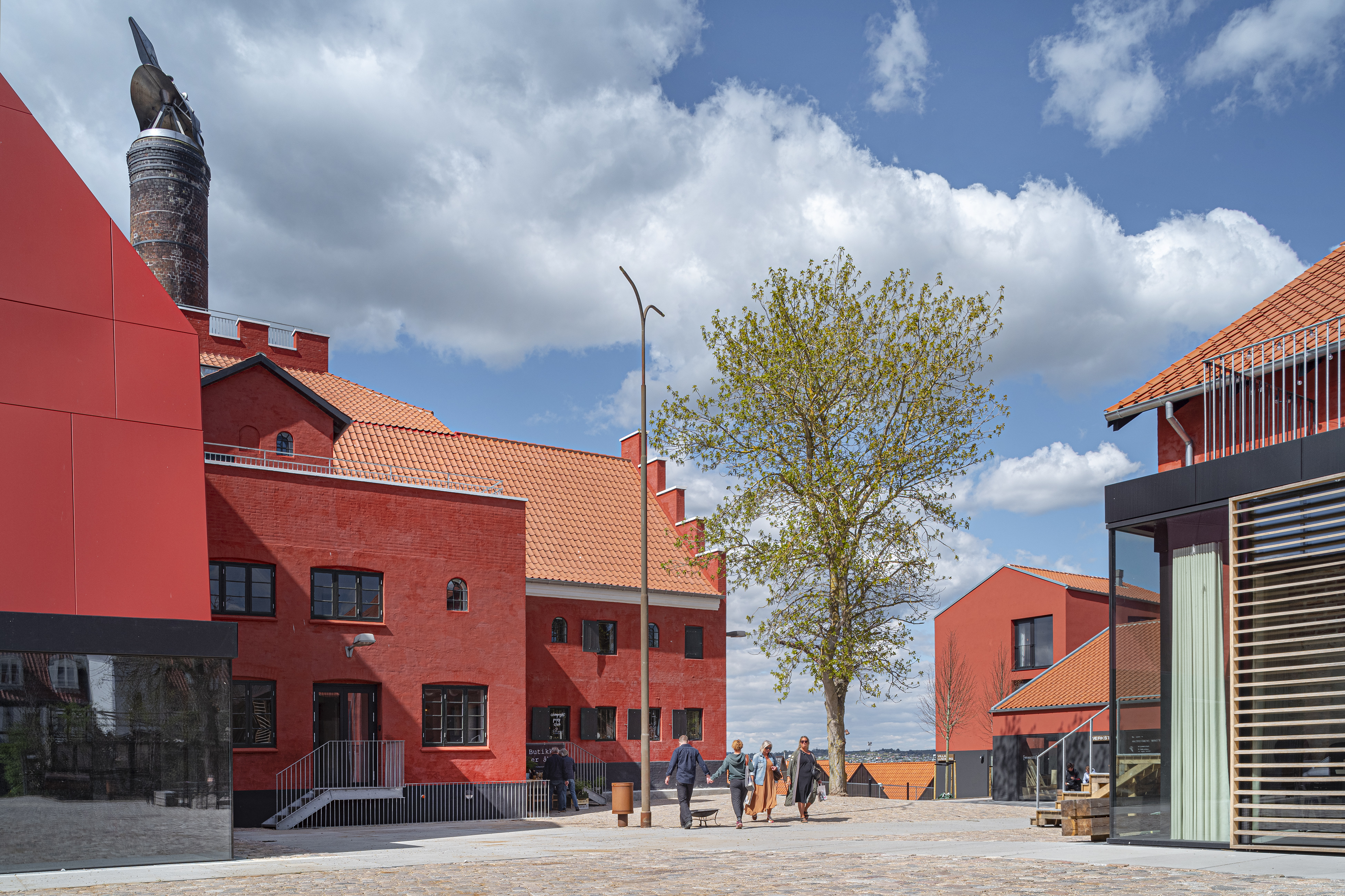 Maltfabrikken i Ebeltoft, set fra øst, 25. april 2020. Fotograf: Jens Lindhe